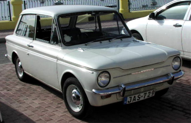 Hillman Imp Sedan